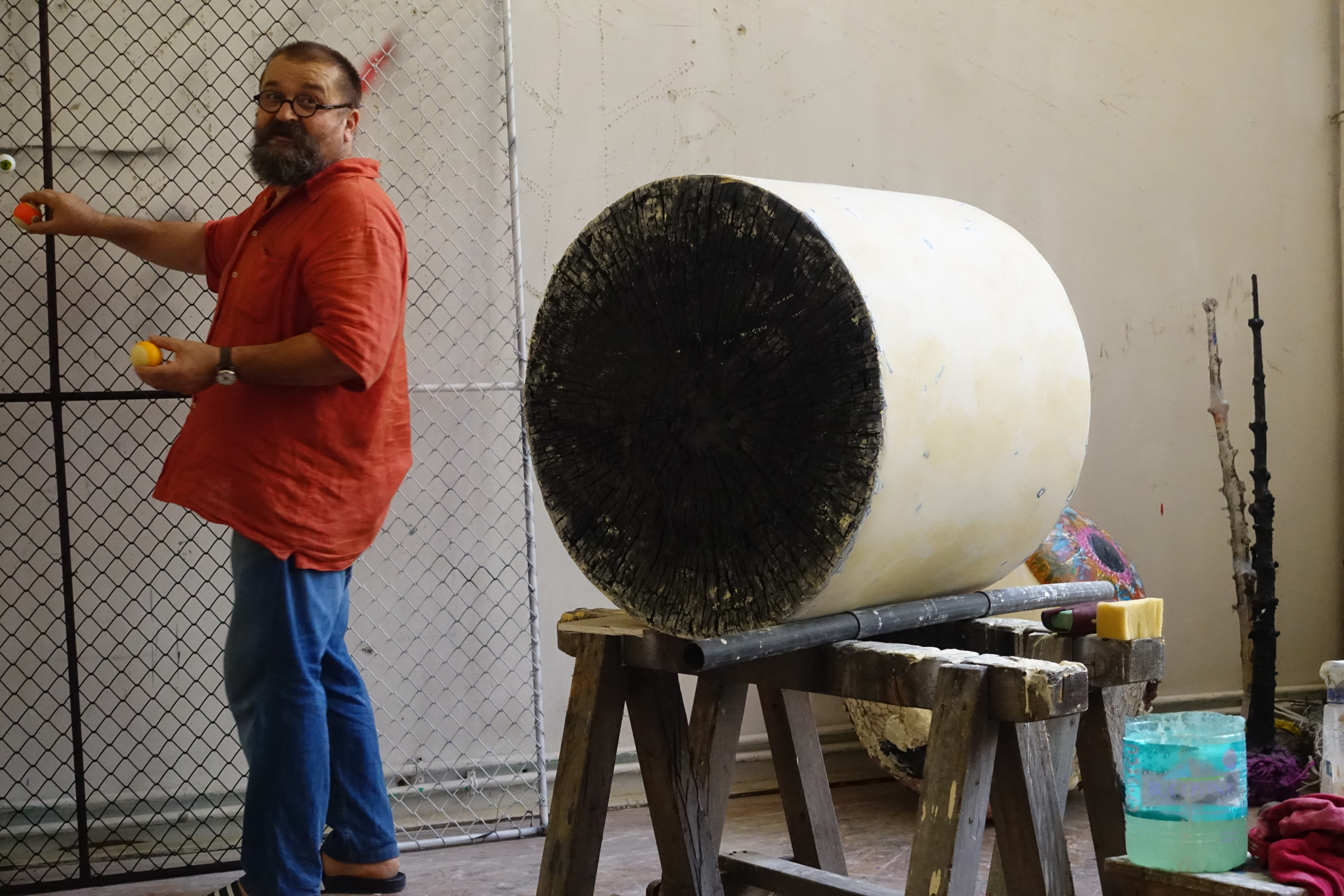 Darie Dup este sculptor care realizeaza si instalatii site-specifice, fotografie si nu in ultimul rand ii place sa isi exprime ideile in desene de mari dimensiuni.... Ruxandra Balaci, Curator, Fondator Director Artistic MNAC, CEO Artagency.ro